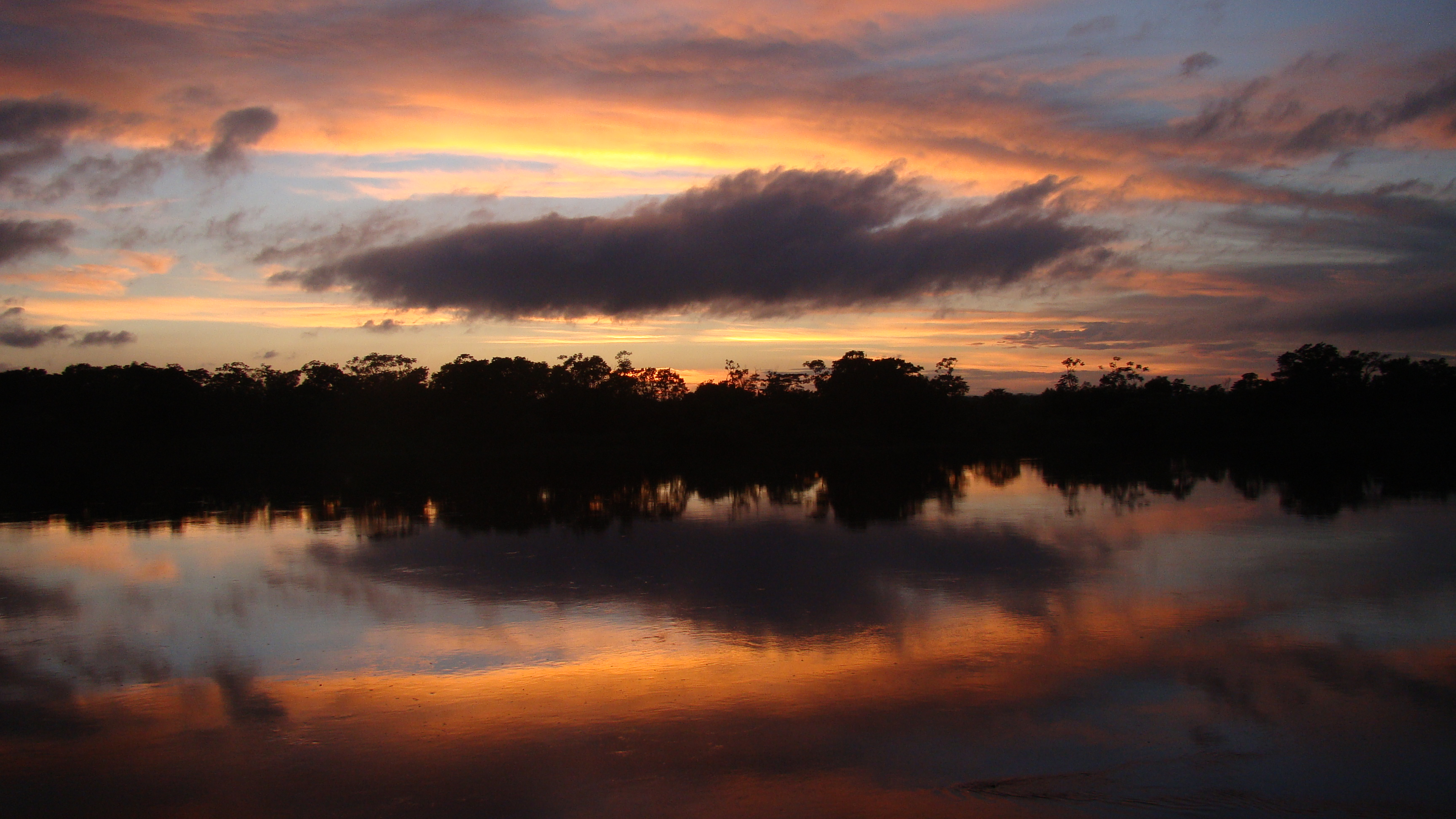 Parque Estadual das Várzeas do Rio Ivinhema de nível Estadual, localizado (a) em Taquarussu (MS), Naviraí (MS), Jateí (MS)